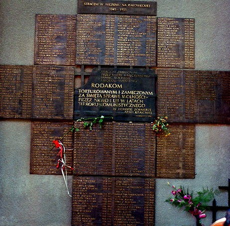 Tablica na Więzieniu śledczym na ul. Rakowieckiej w Warszawie